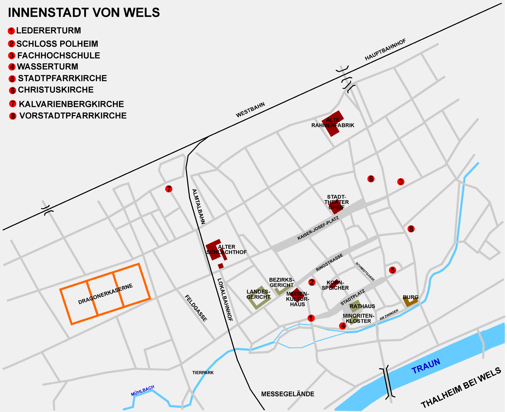 Plan der Innenstadt von Wels (genordet)